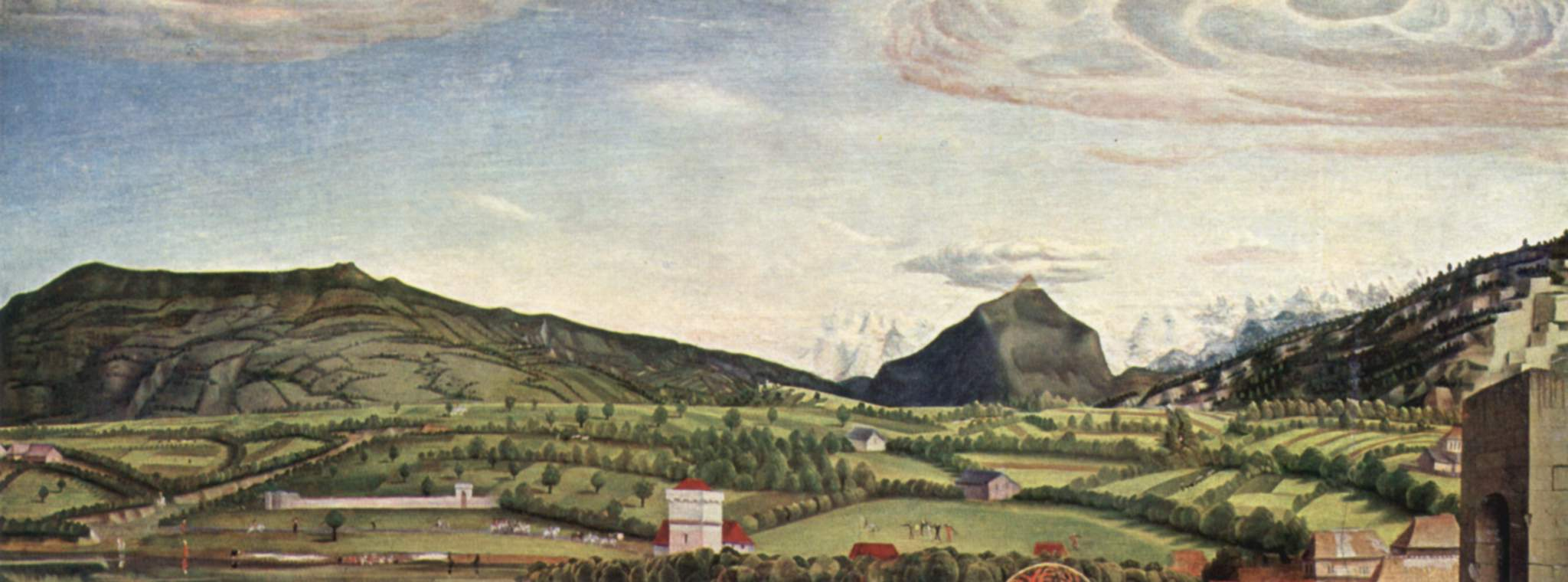 Petrusaltar, Fragment eines Altares der Petrus-Kathedrale in Genf, linker Flügel außendetail: Landscape